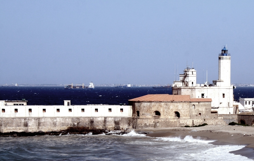 Phare de l'amirauté - Alger